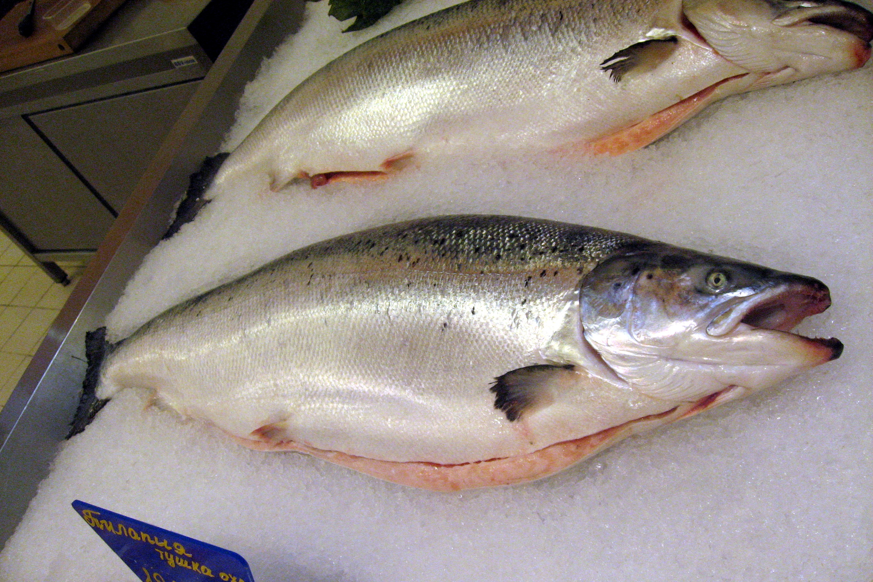 Losos v obchodě v Petrohradě